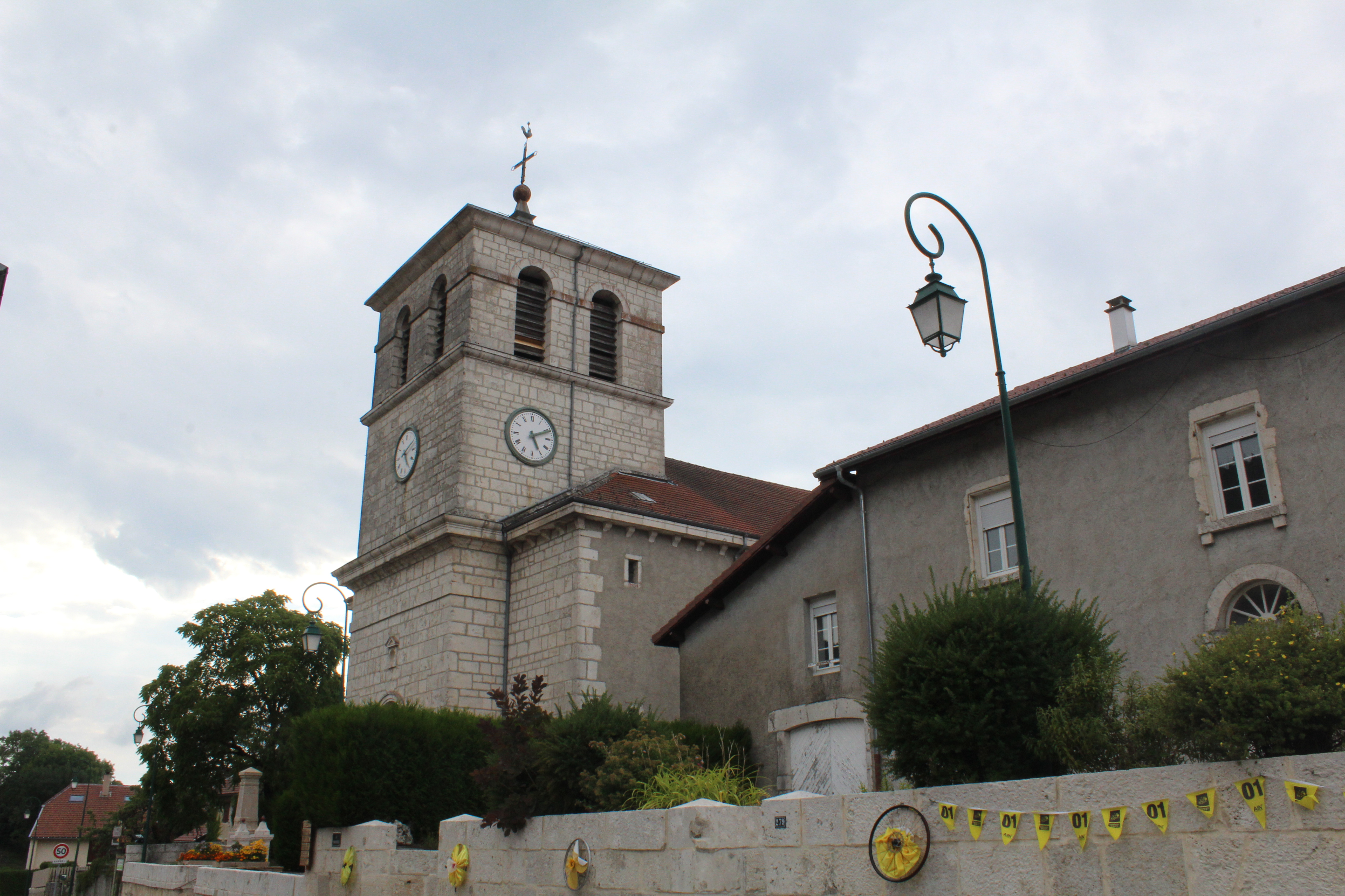 Église Saint-Félix du Poizat, Le Poizat-Lalleyriat.